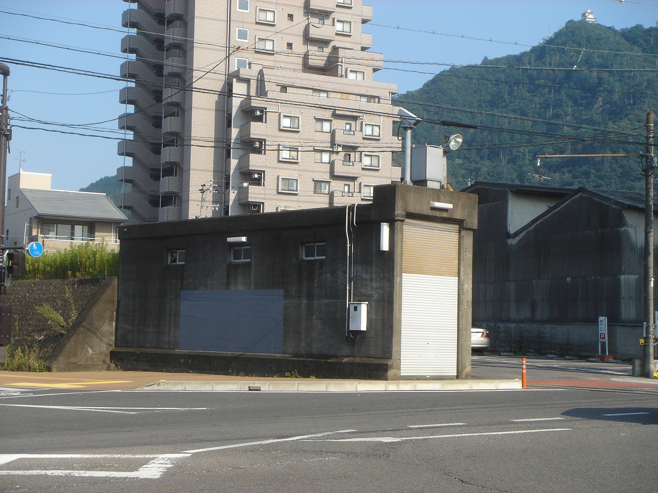 Nagara Rikko(長良橋陸閘の長良陸閘（右岸側）),Gifu,Gifu,Japan(岐阜県岐阜市)で撮影。後ろにの山が金華山。